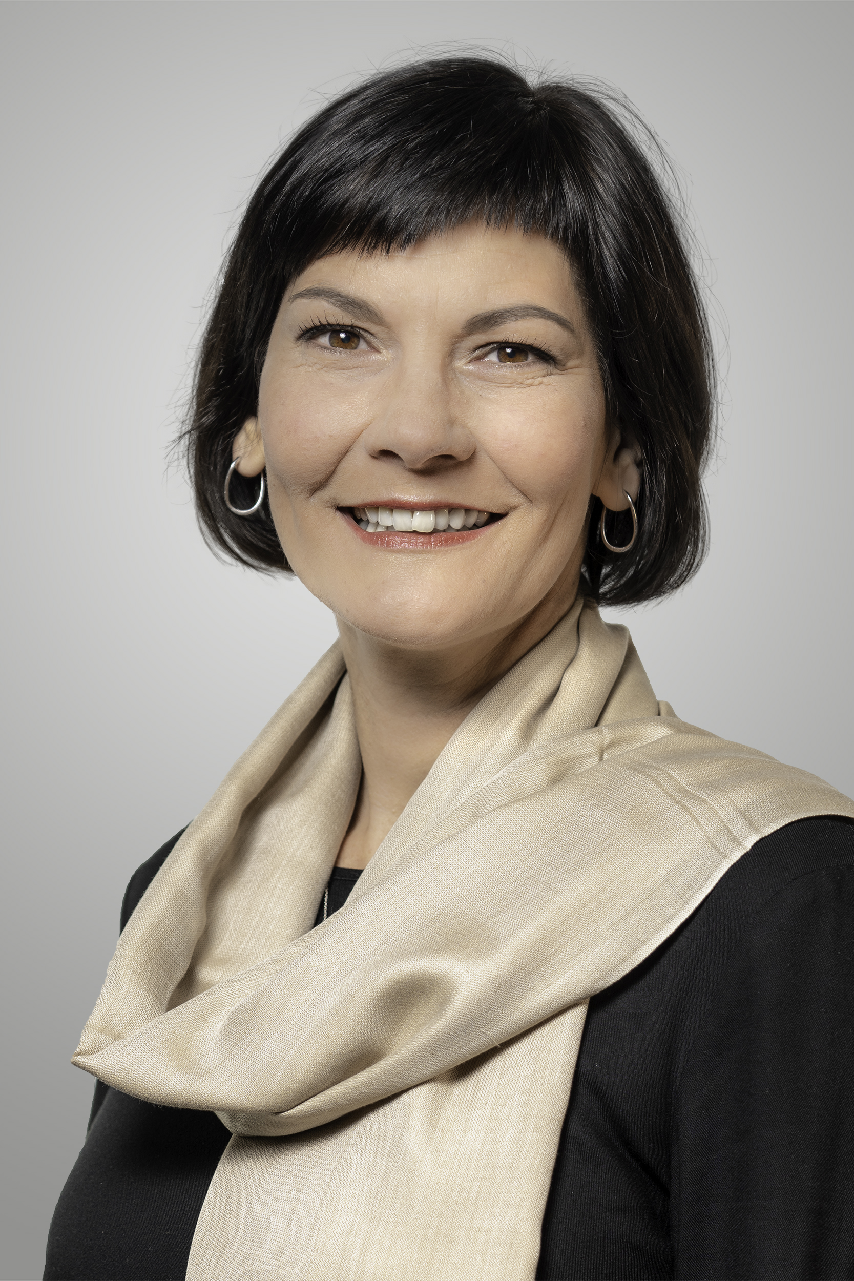 Eva Goldbach